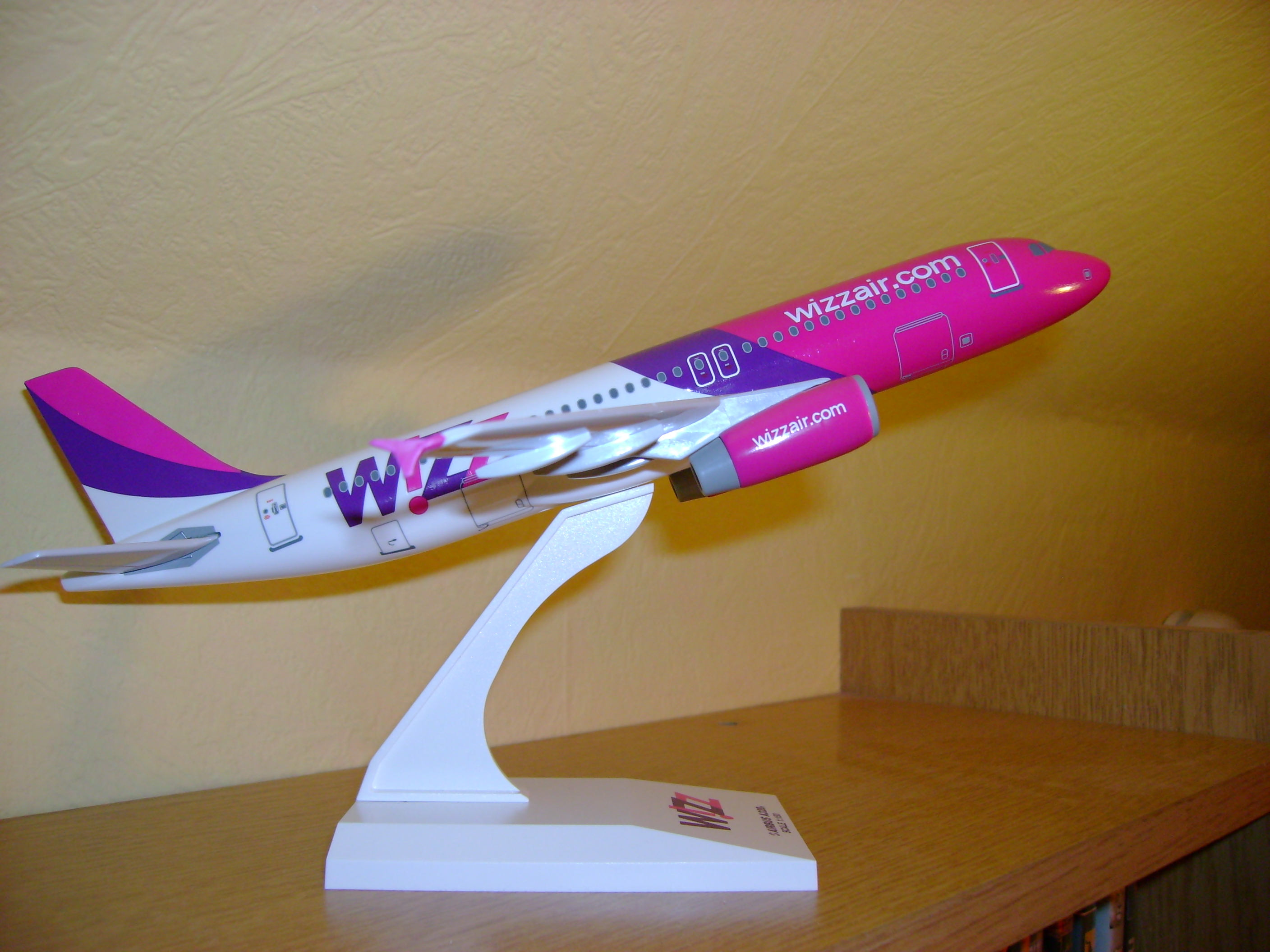 Airbus A320 repülőgépmodell a Wizz Air légitársaság színeiben